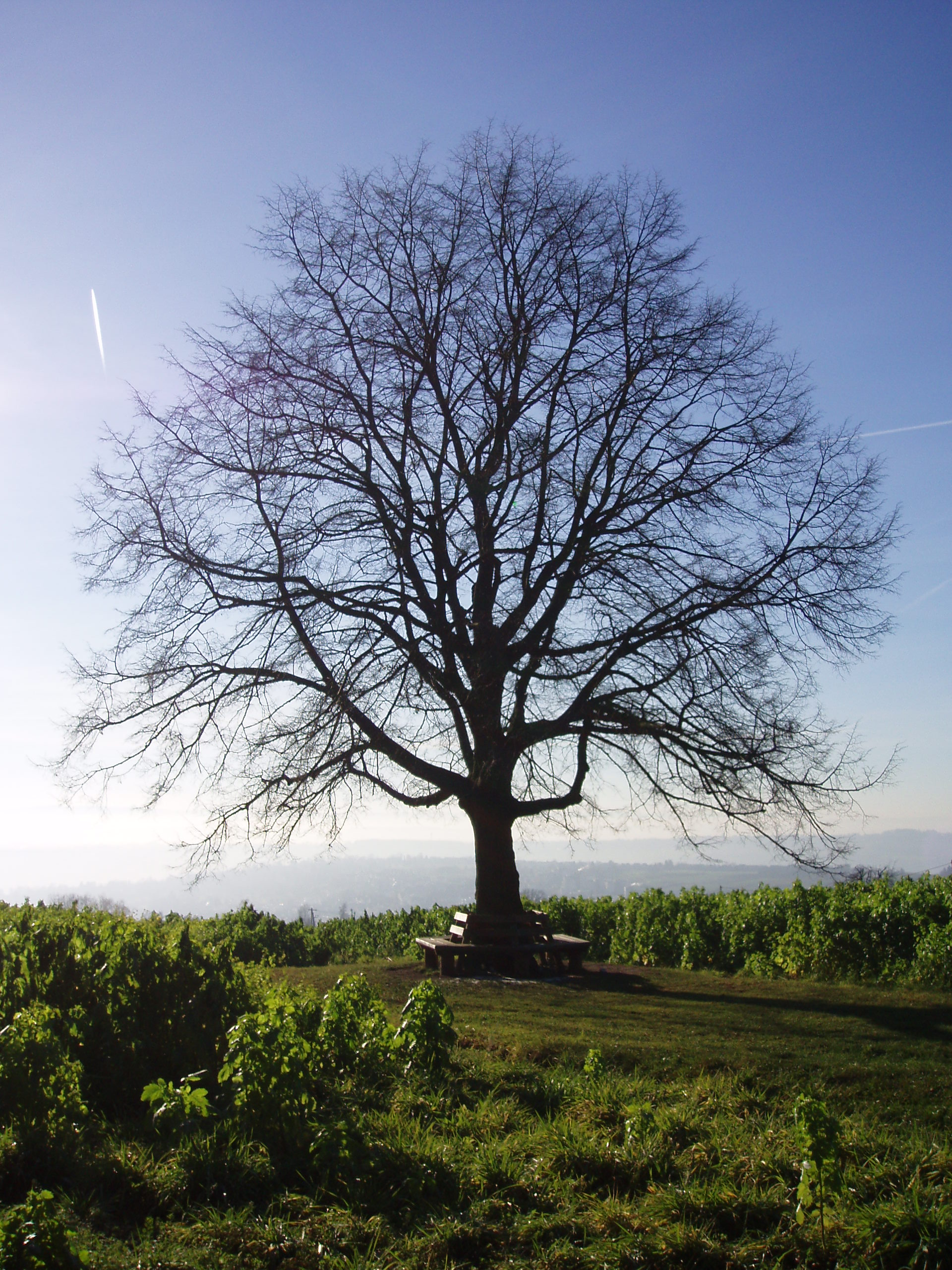 Katharinenlinde bei Esslingen am Neckar